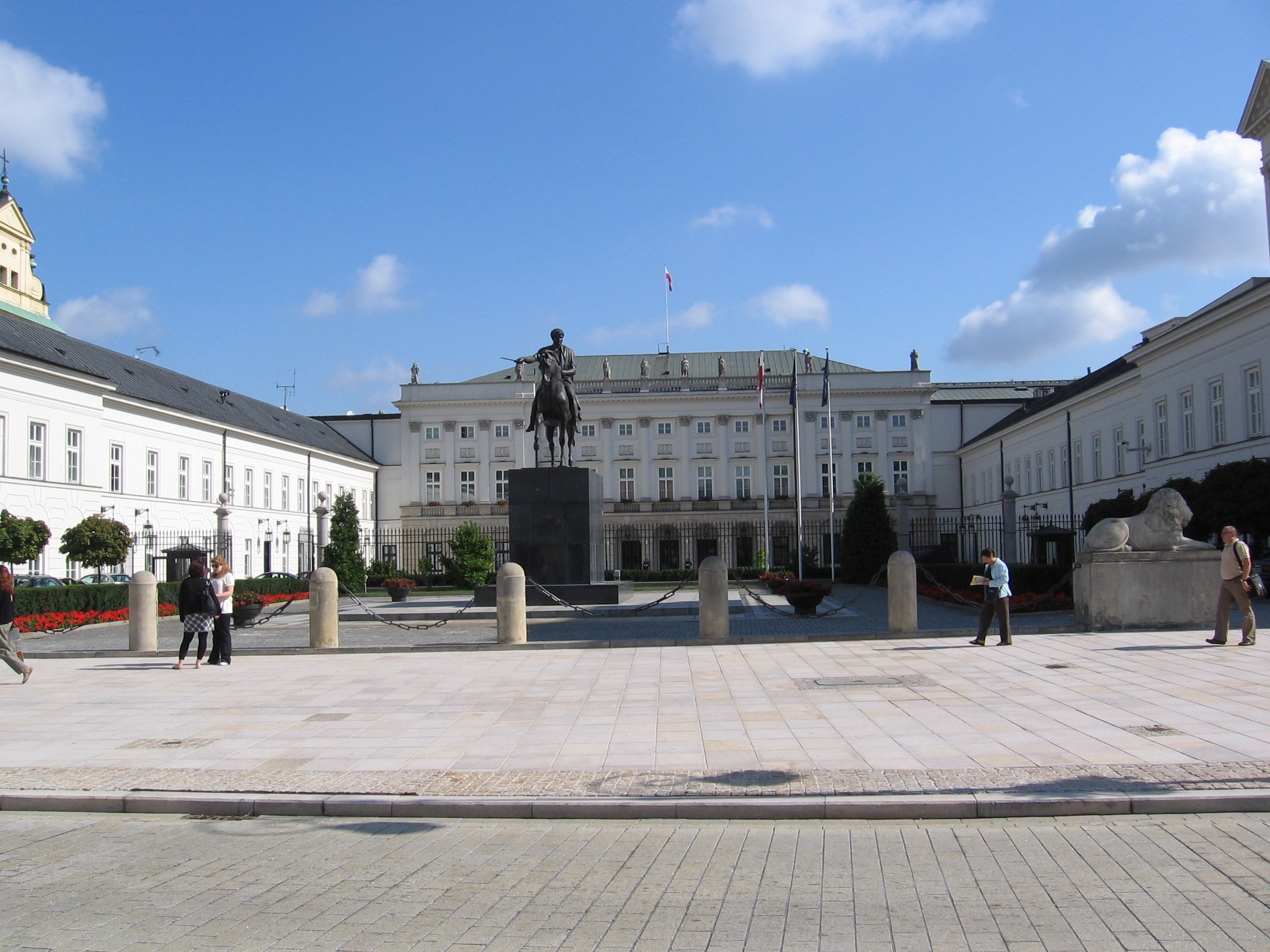 Президентський палац. Варшава.